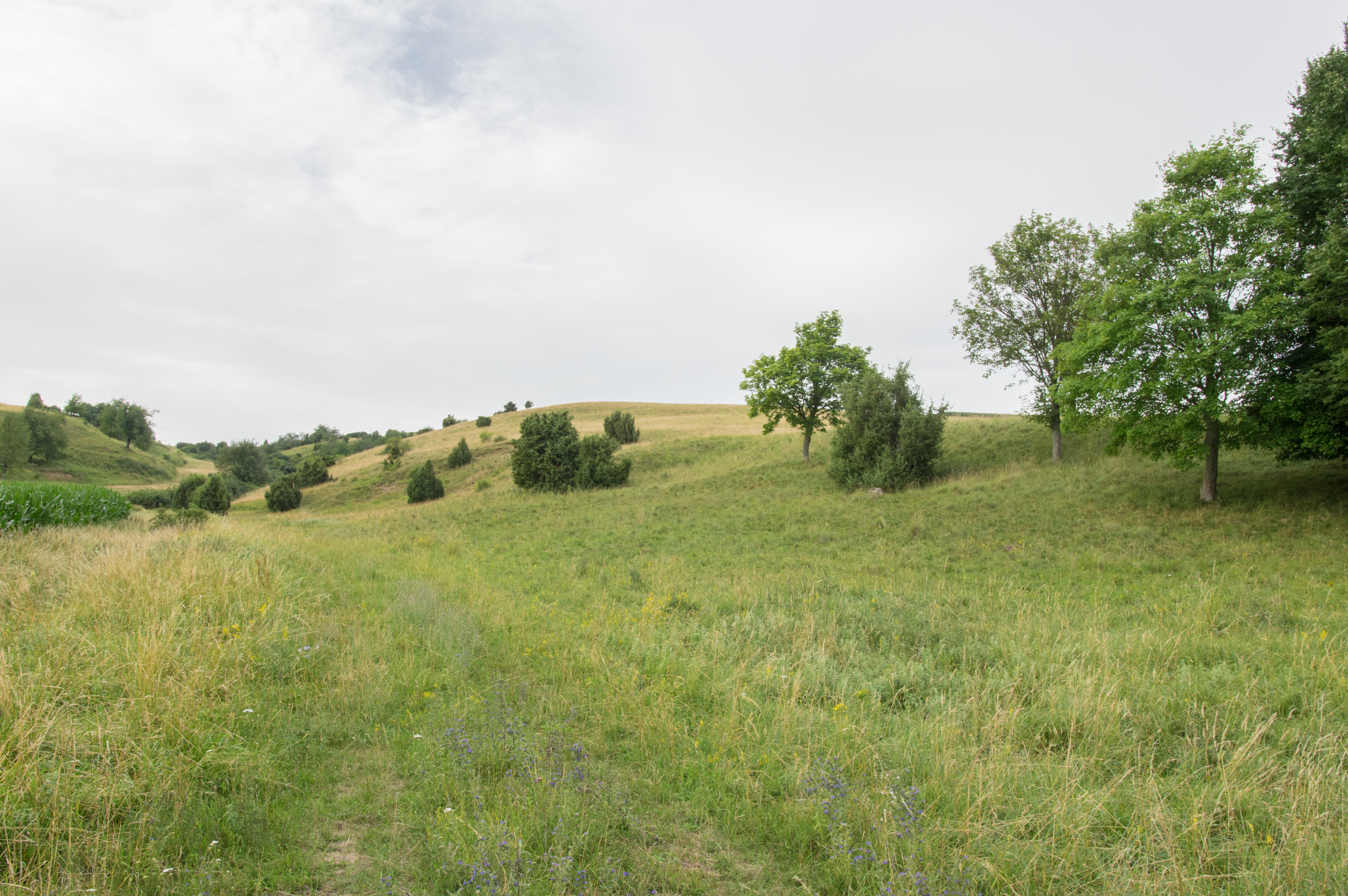 Blick von Osten gegen den Hang südwesttlich Schmähingen, Ausschnitt. Landschaftsschutzgebiet Schmähingen West LSG-00353.02